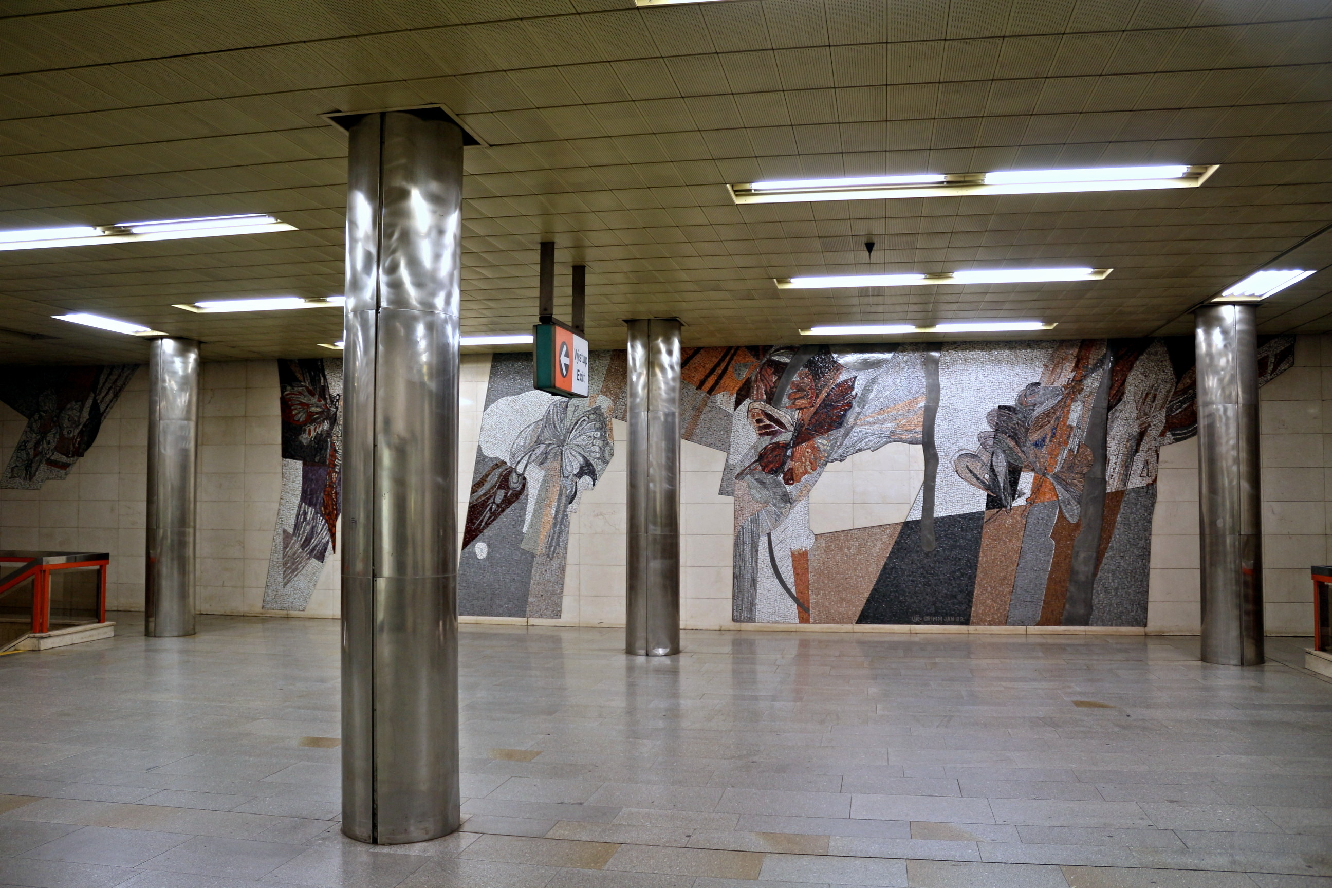 Pražské metro, stanice Skalka